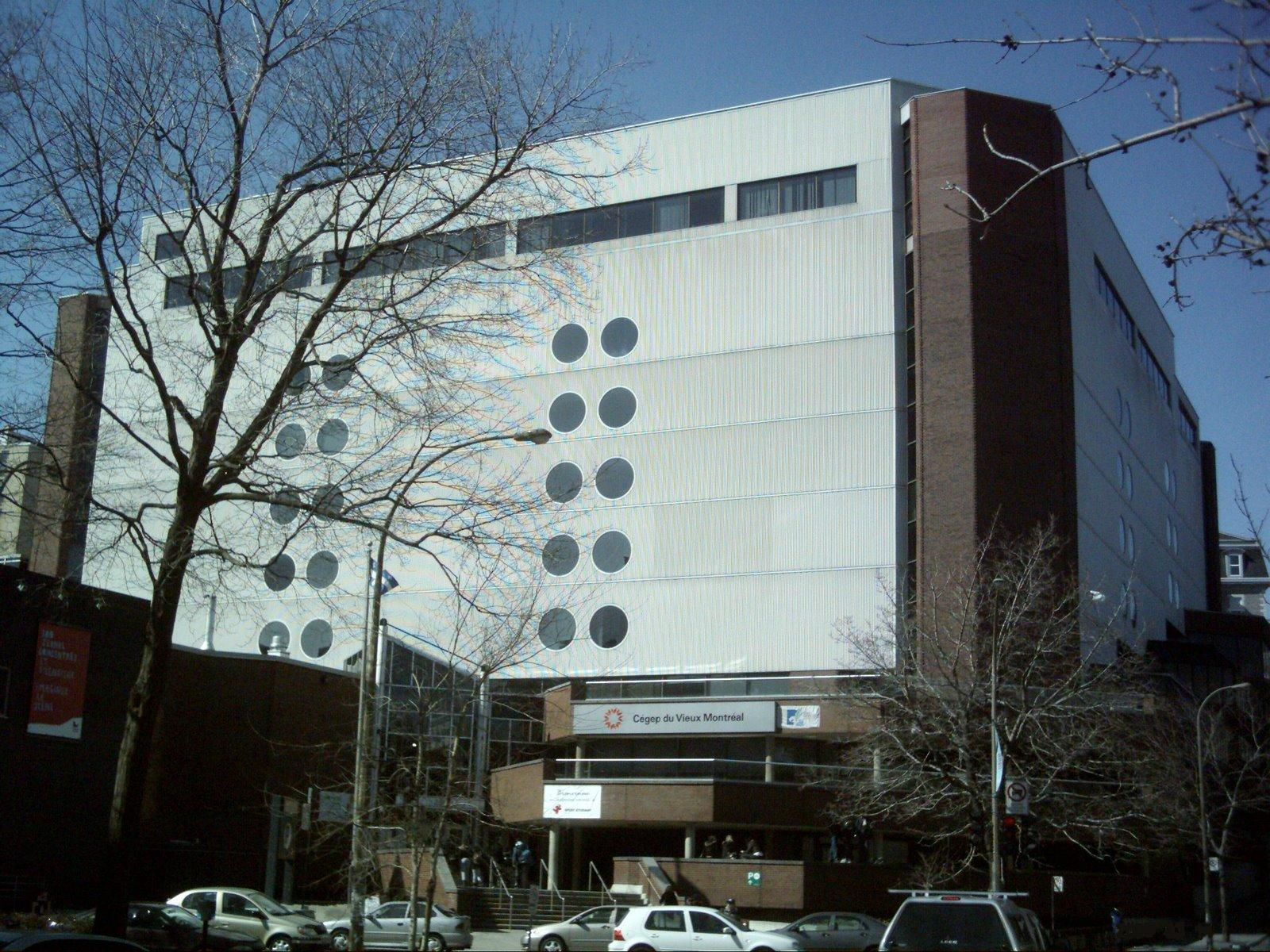 Cégep du Vieux Montréal